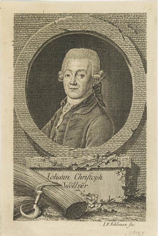 Bildnis des Johann Christoph Wöllner von Johann Friedrich Schleuen (senior), Stecher (fl. 1758/1775). ; Leipzig, Universitätsbibliothek Leipzig, Porträtstichsammlung, Inventar-Nr. 58/65 Literatur: Mortzfeld A 24255